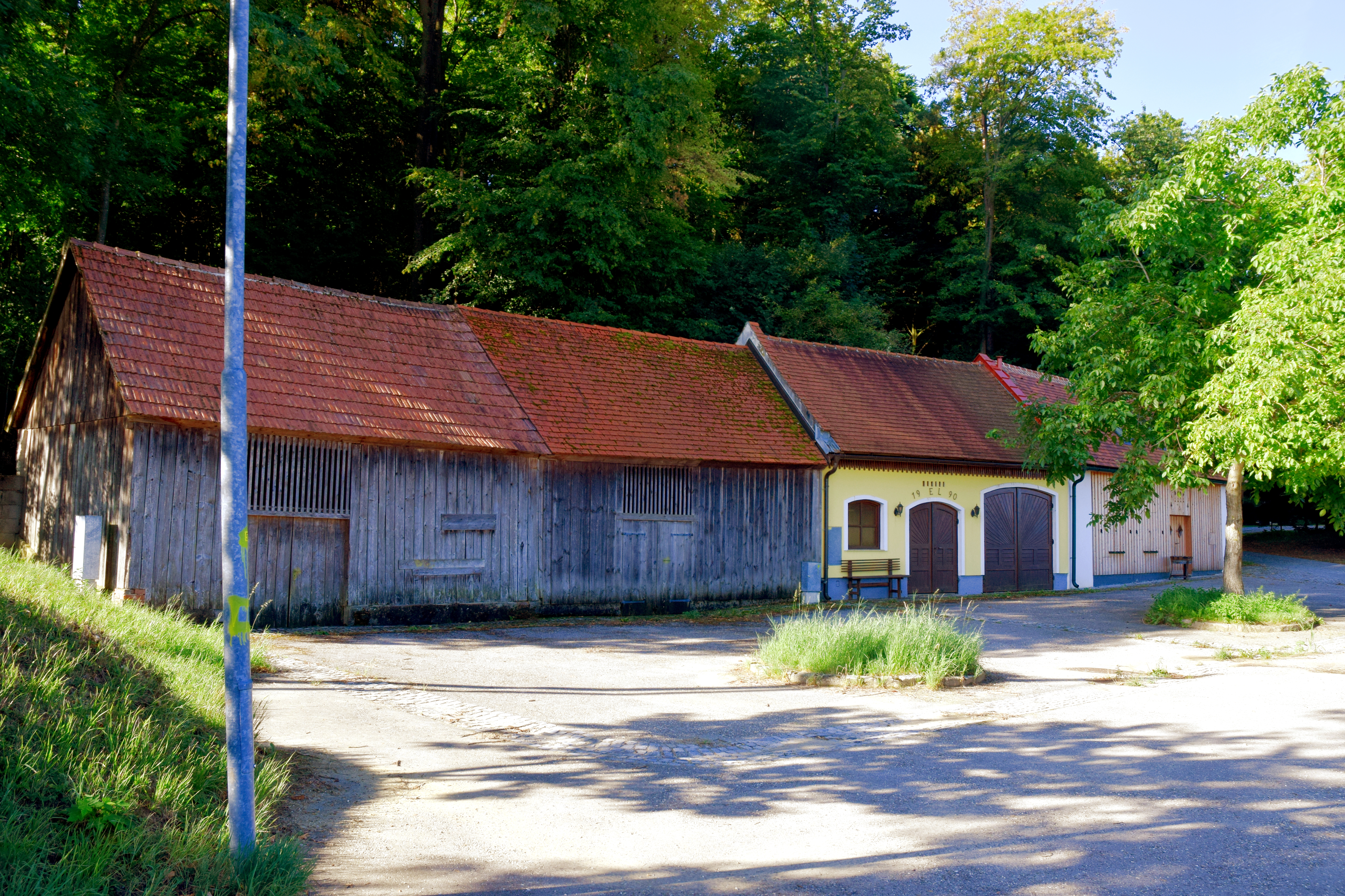 Kellergasse Hägerberg in der KG Michelndorf in Michelhausen